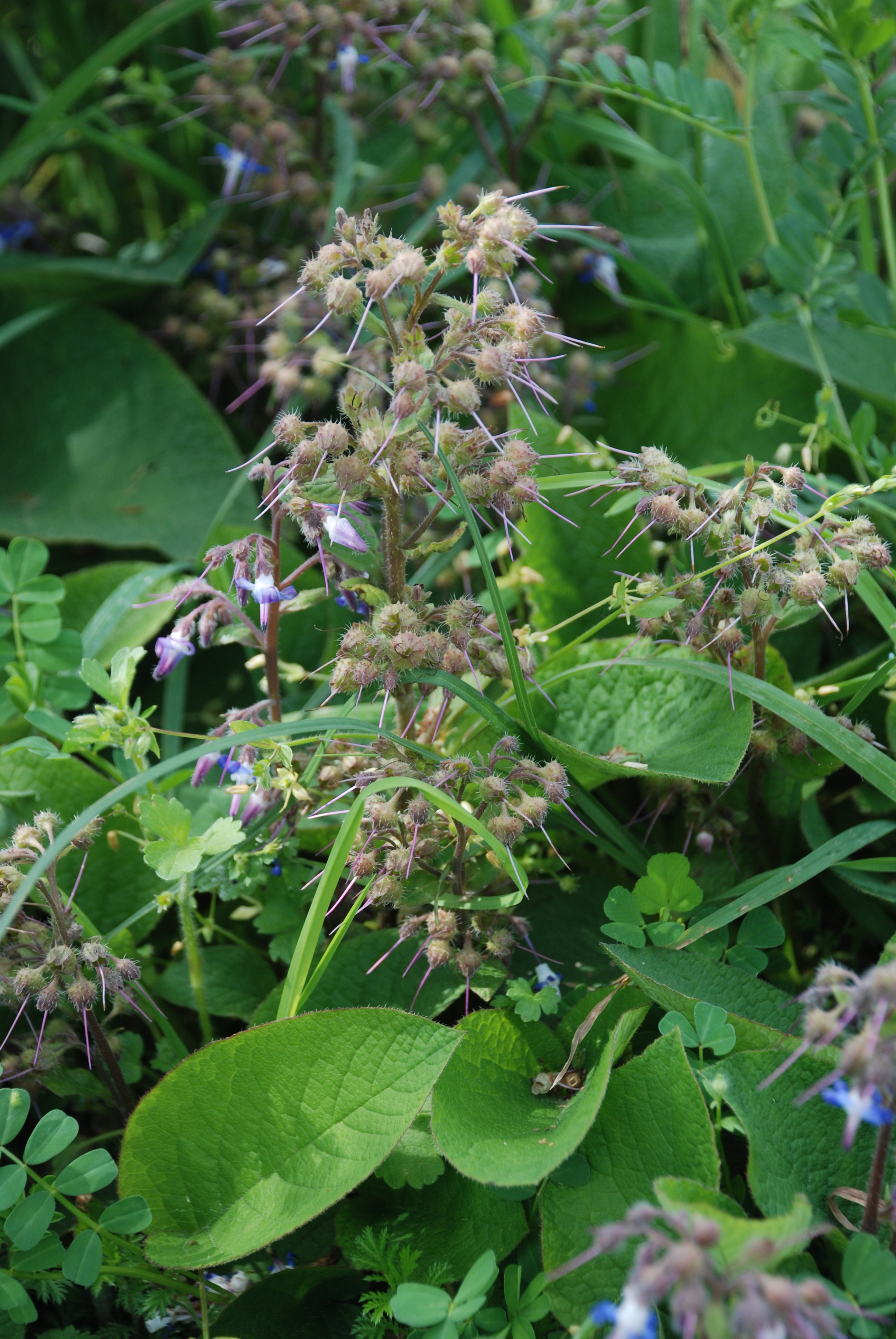 Denizdağı, Kocaali, Sakarya'da Kaldirik, Ispıt otu.